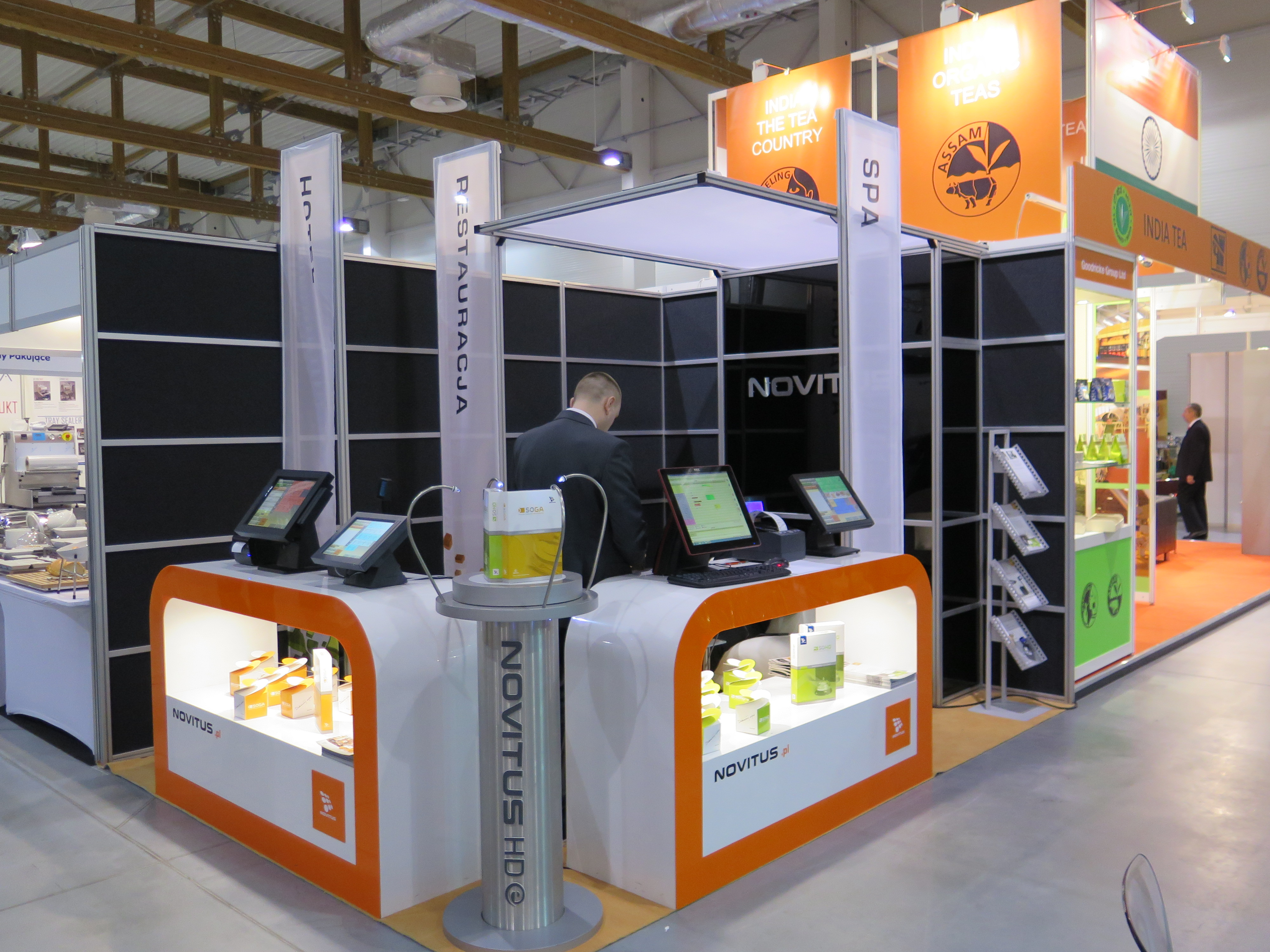 Asortyment rozwiązań IT firmy "Novitus" podczas HORECA 2014 w Krakowie